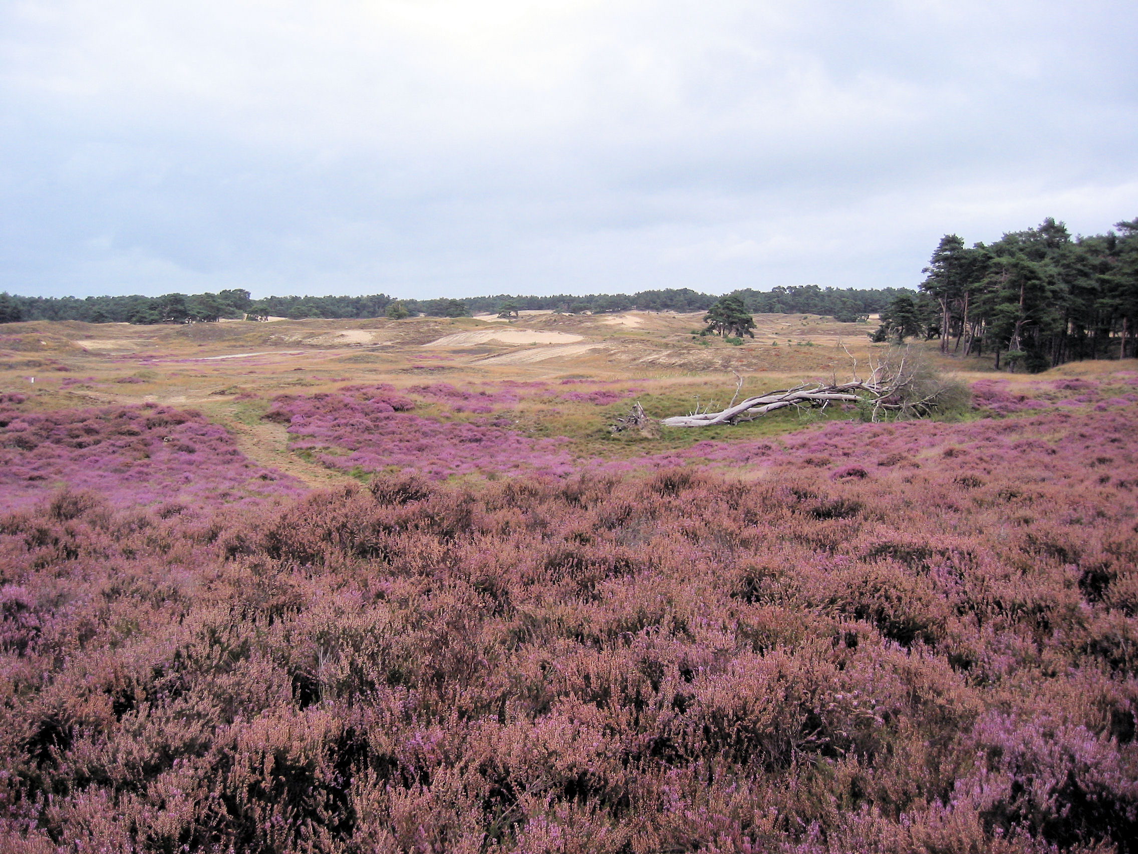 Wekeromse Zand heideveld